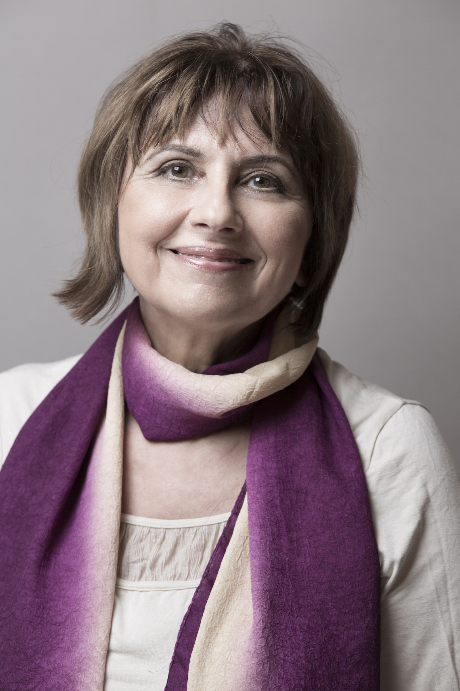 Srpski (latinica): Andjelka Mihajlov